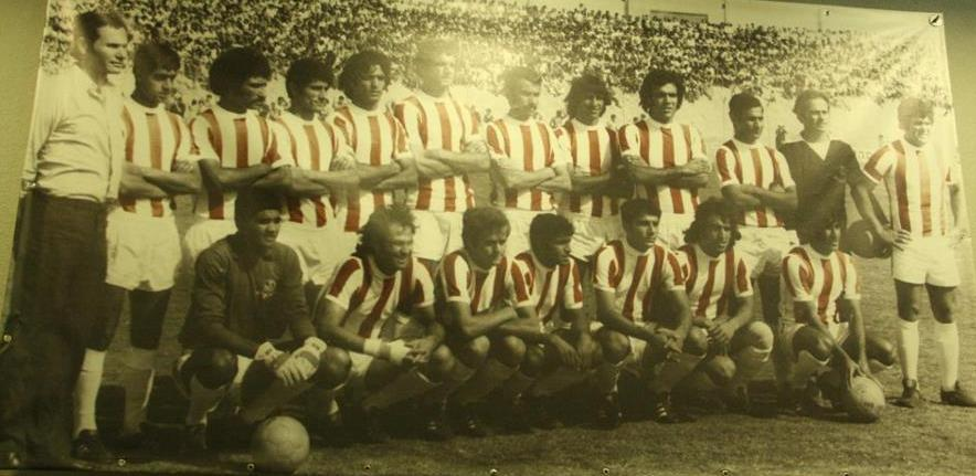 האלופים מבאר שבע